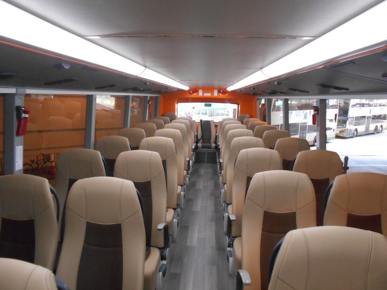 中文（香港）: 龍運巴士2016年豪華巴士的上層車廂